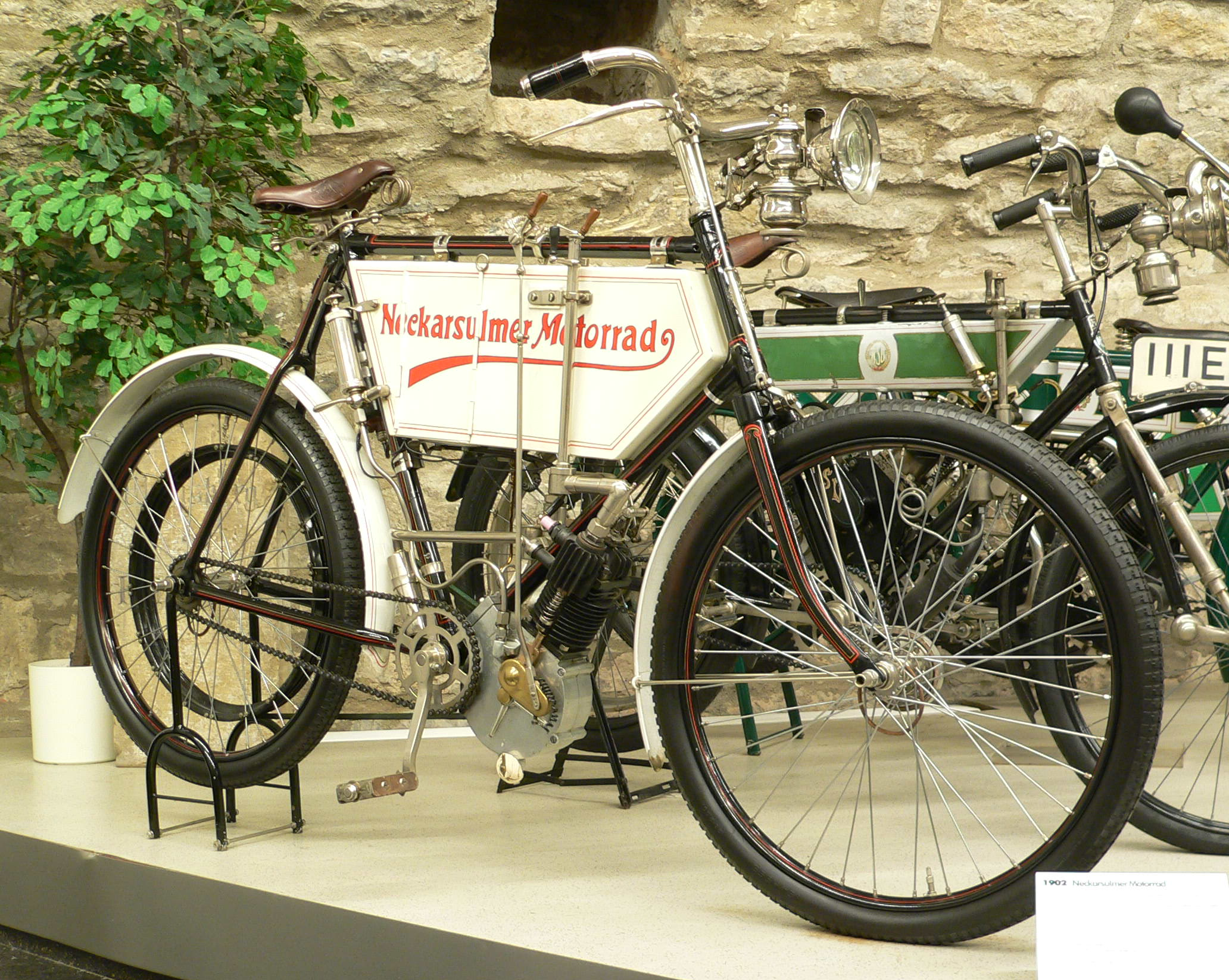 Motorbike "Neckarsulmer 1 1/4 PS" (1902) at the Deutsches Zweirad- und NSU-Museum